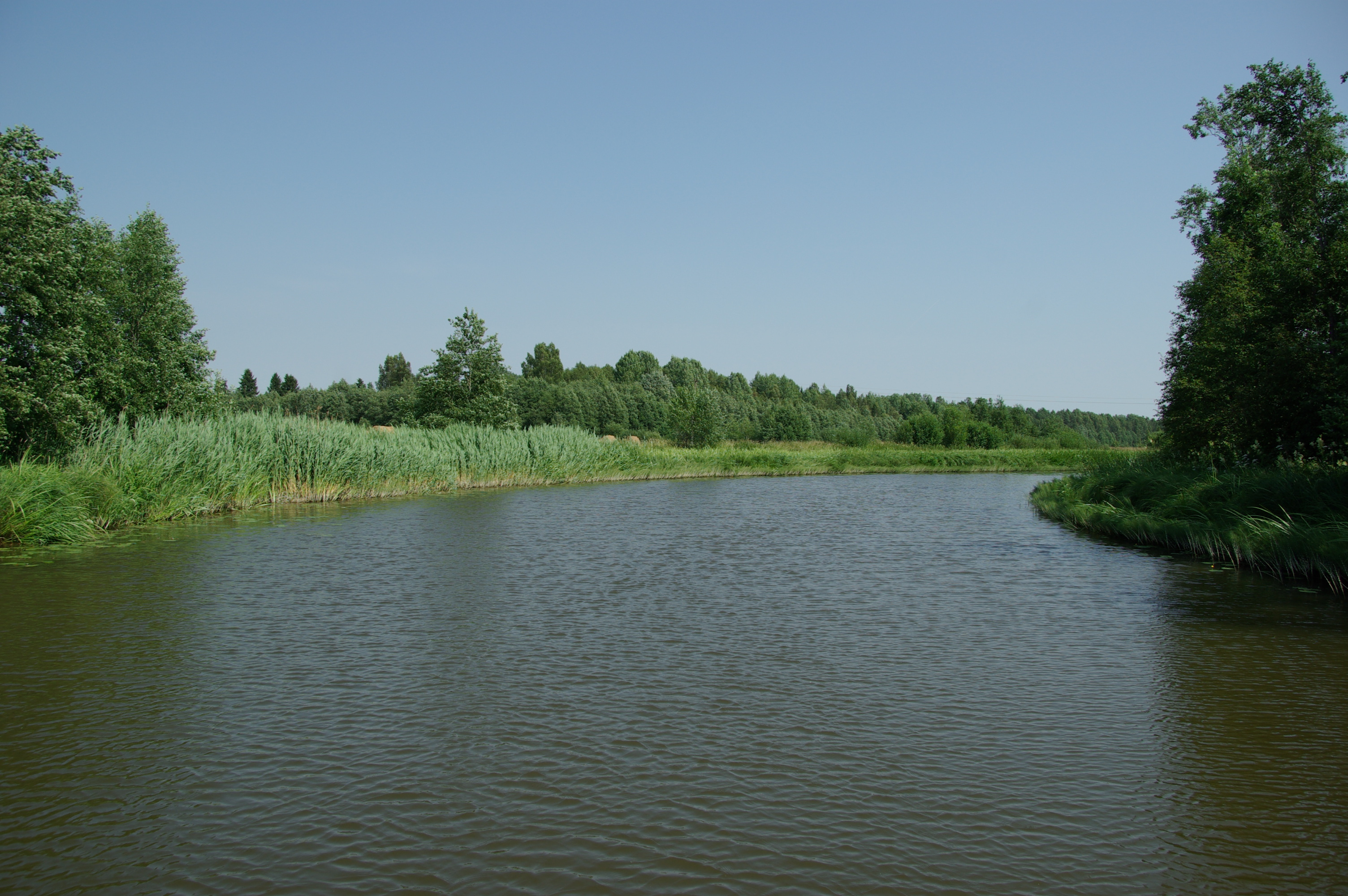 Vigala jõgi (vanem nimetus Konuvere jõgi) (ka Koluvere jõgi) on Kasari veerohkeim lisajõgi.See pilt on tehtud Raikküla vallas Tamme küla lähedal